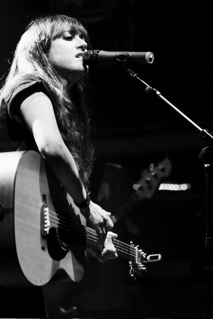 Nena Daconte en directo palacio de Vistalegre